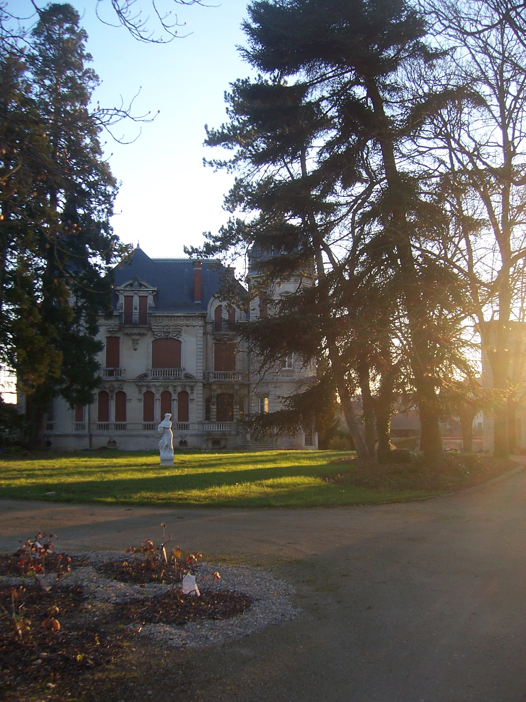 Chagny Chateau Diot